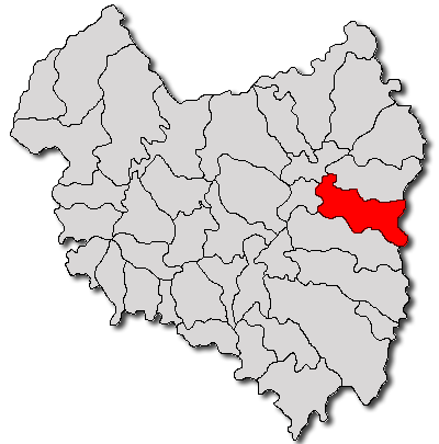 Categorie:Hărţi ale judeţului Covasna